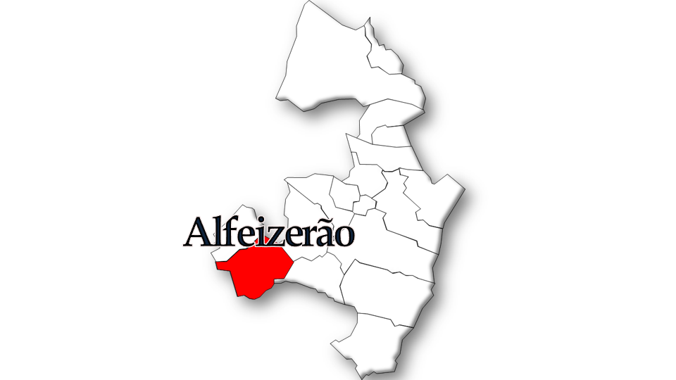 População